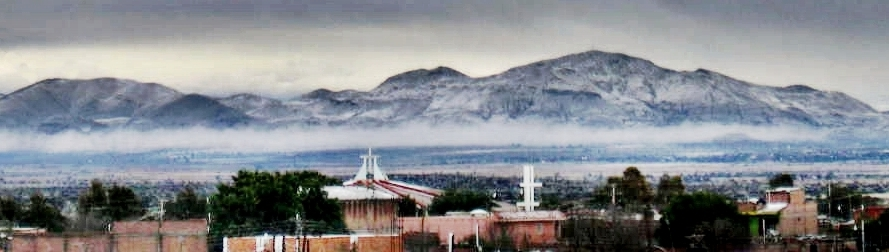 Pedregoso (2009) vista del cerro de Pinos al fondo, Parroquia Del Señor De La Misericordia en el centro.